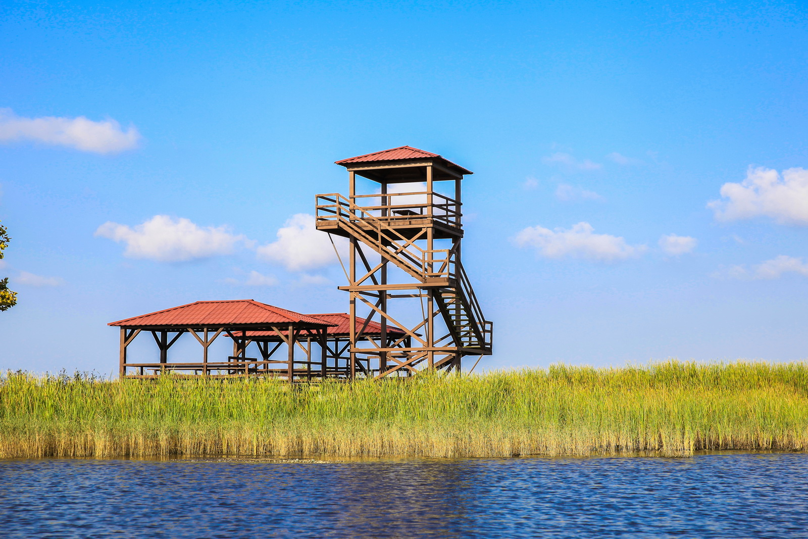 კოლხეთის ეროვნული პარკი მდებარეობს დასავლეთ საქართველოში. იგი მოიცავს შავი ზღვის აღმოსავლეთ სანაპირო ზოლსა და პალიასტომის ტბის აუზს. ეროვნული პარკი კოლხეთის საერთაშორისო მნიშვნელობის მქონე ჭარბტენიანი ეკოსისტემების დაცვისა და შენარჩუნების მიზნითაა შექმნილი. ეროვნული პარკის უბნები ხუთი ადმინისტრაციული რაიონის - ზუგდიდის, ხობის, სენაკის, აბაშისა და ლანჩხუთის ტერიტორიაზეა განლაგებული და საქართველოს ორი ისტორიული მხარის, სამეგრელოსა და გურიის ნაწილია. კოლხეთის ეროვნული პარკის ადმინისტრაცია ტურისტებს პალიასტომის ტბასა და მდ. ფიჩორის ხეობაში სანაოსნო ტურებს, ასევე სპორტულ თევზჭერას, ფრინველებზე დაკვირვებას (ბერდვოჩინგს) და ეკო-საგანმანათლებლო ტურებს სთავაზობს.